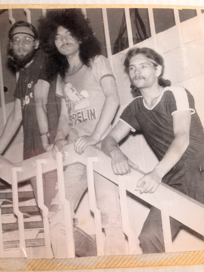 музыканты, Ленинградский рок-клуб